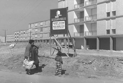 NEW HOUSING PROJECT BUILT BY RASCO, ASHDOD.